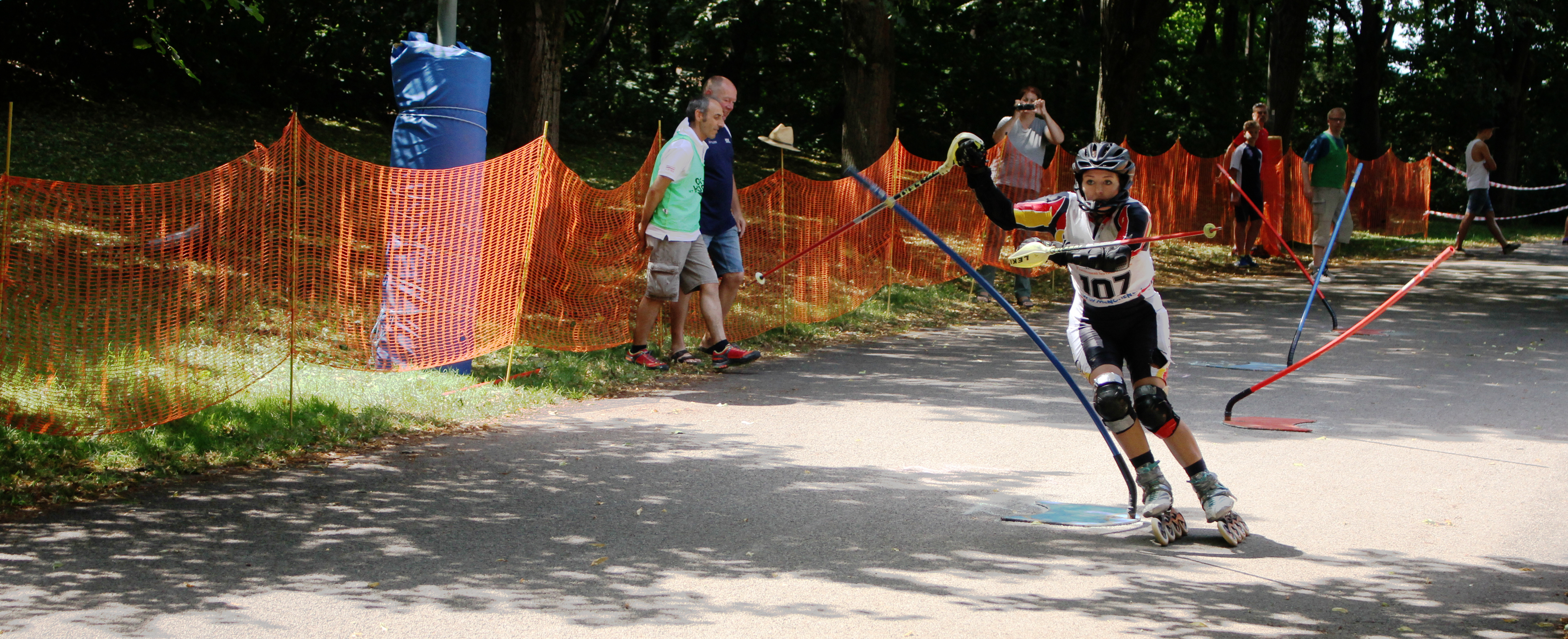 Inline-Alpin - Internationaler Münchner Inline Cup, Westpark, München.